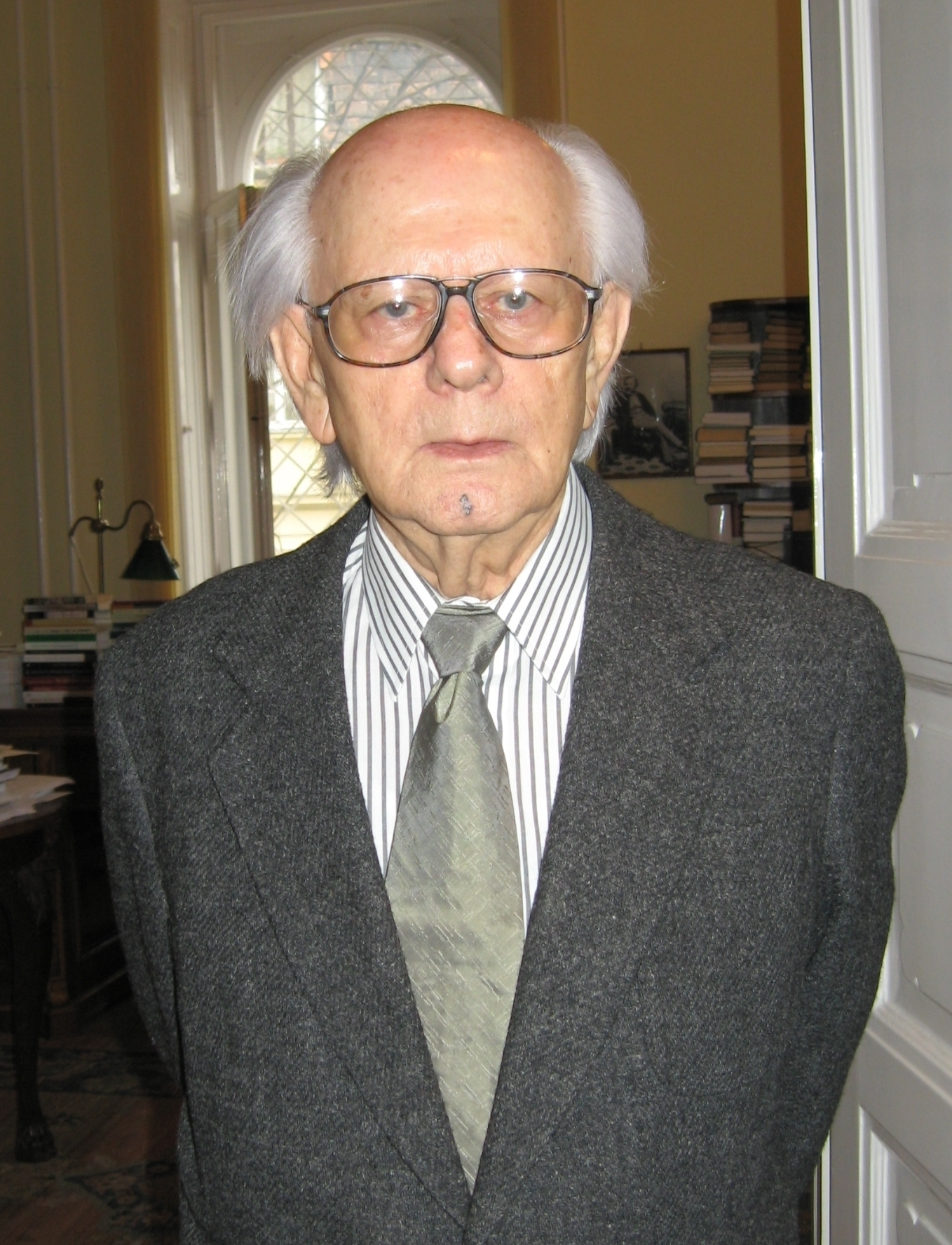 Bodnár György (Karcag, 1927. július 23. – Budapest, 2008. október 29.) Széchenyi-díjas magyar irodalomtörténész, egyetemi tanár, az irodalomtudomány doktora (1987), professor emeritus.